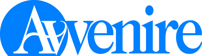 Attuale logo di Avvenire